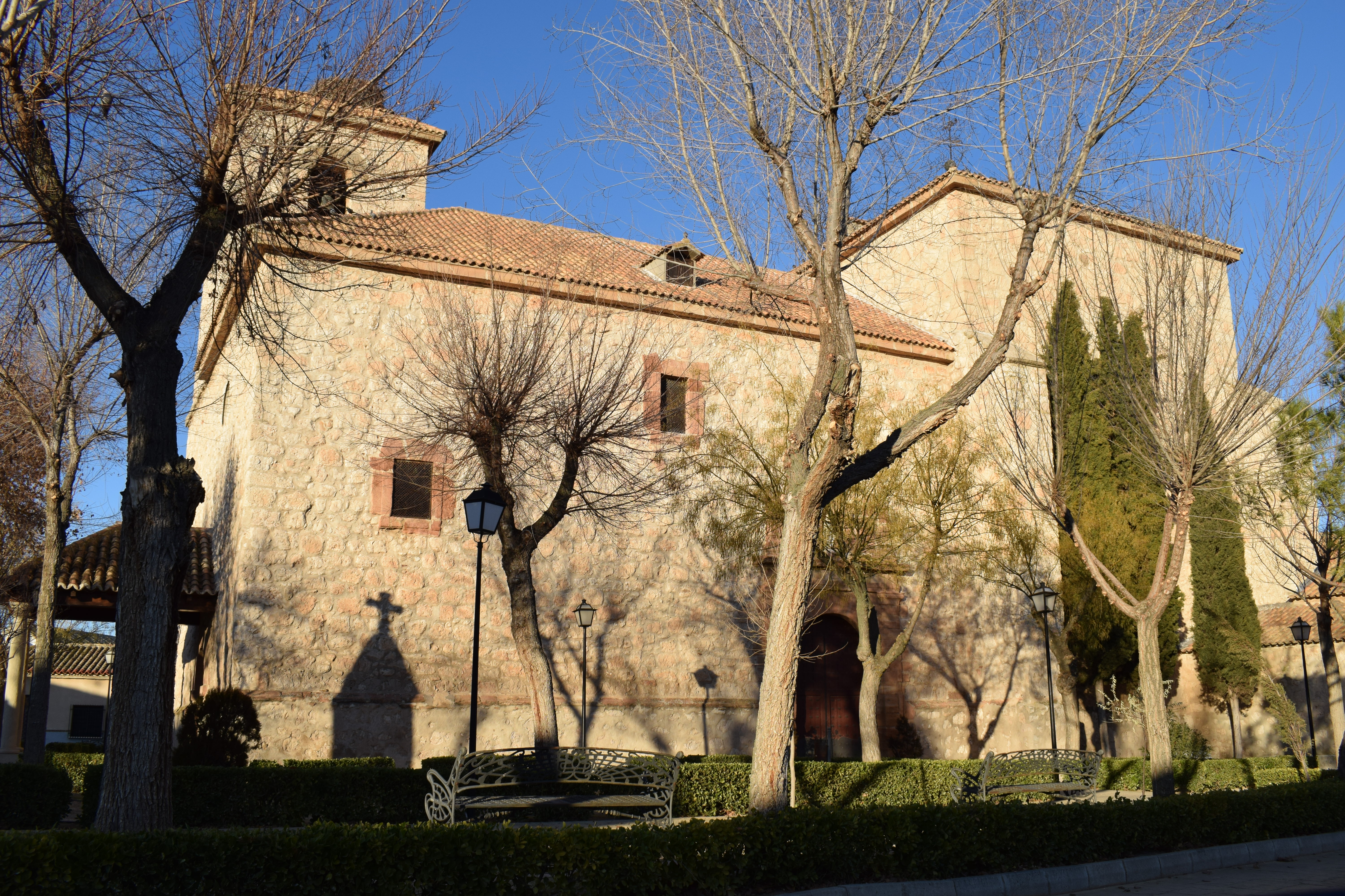 Vista lateral de la Parroquia Ntra. Sra. de la Asunción, Quero